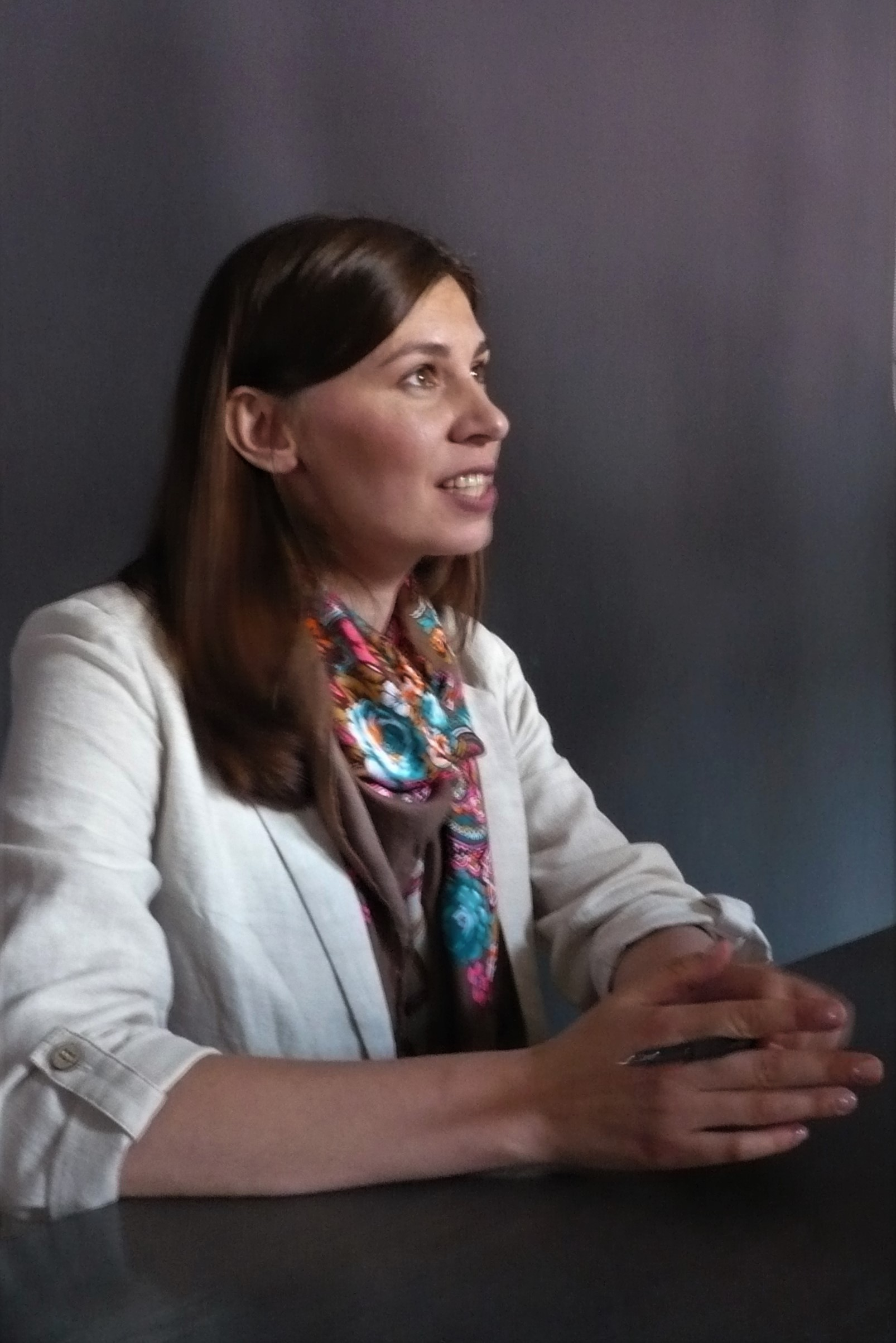 Tania Malarczuk, Festiwal Góry Literatury, Nowa Ruda, 2019